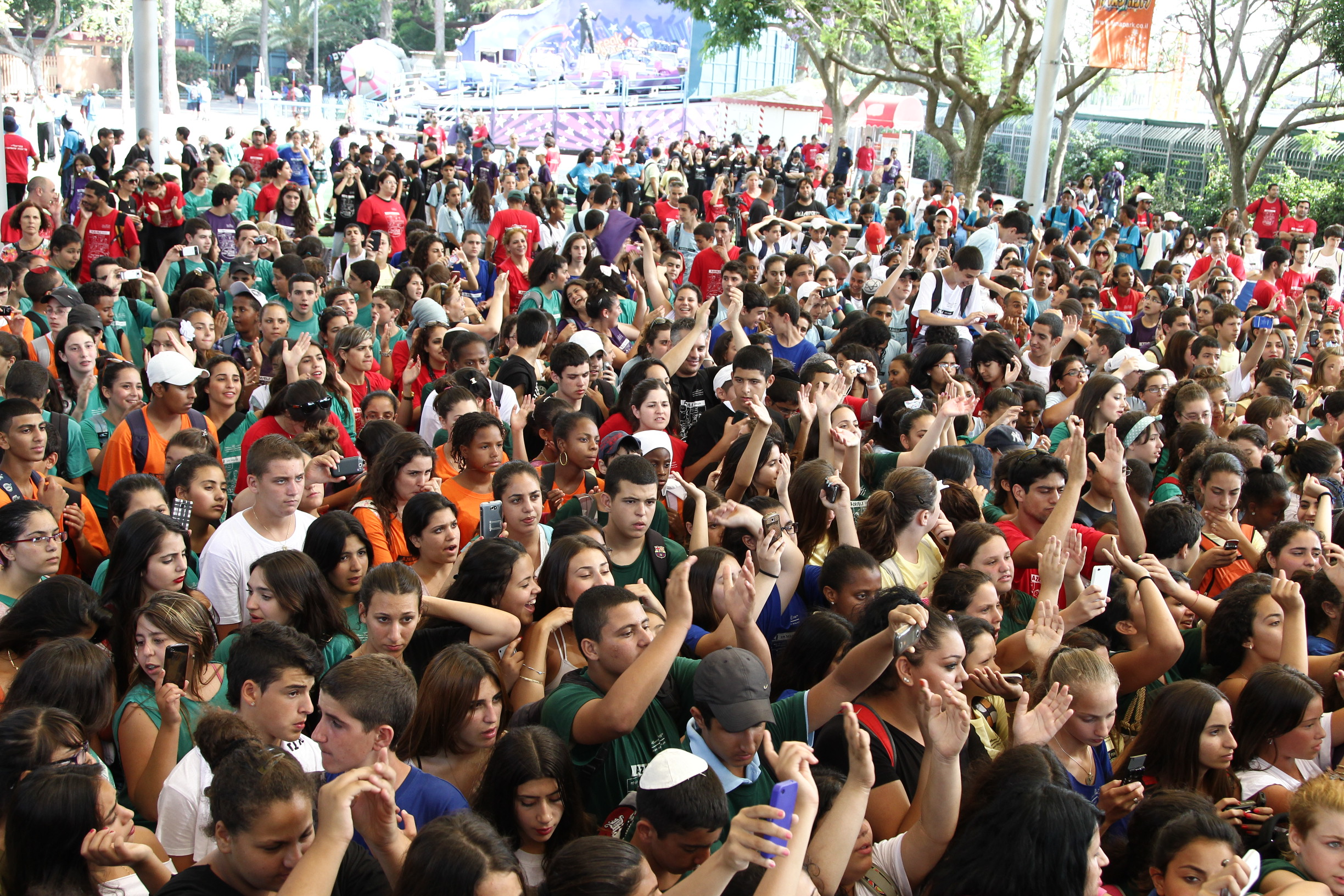 תלמידי התכנית